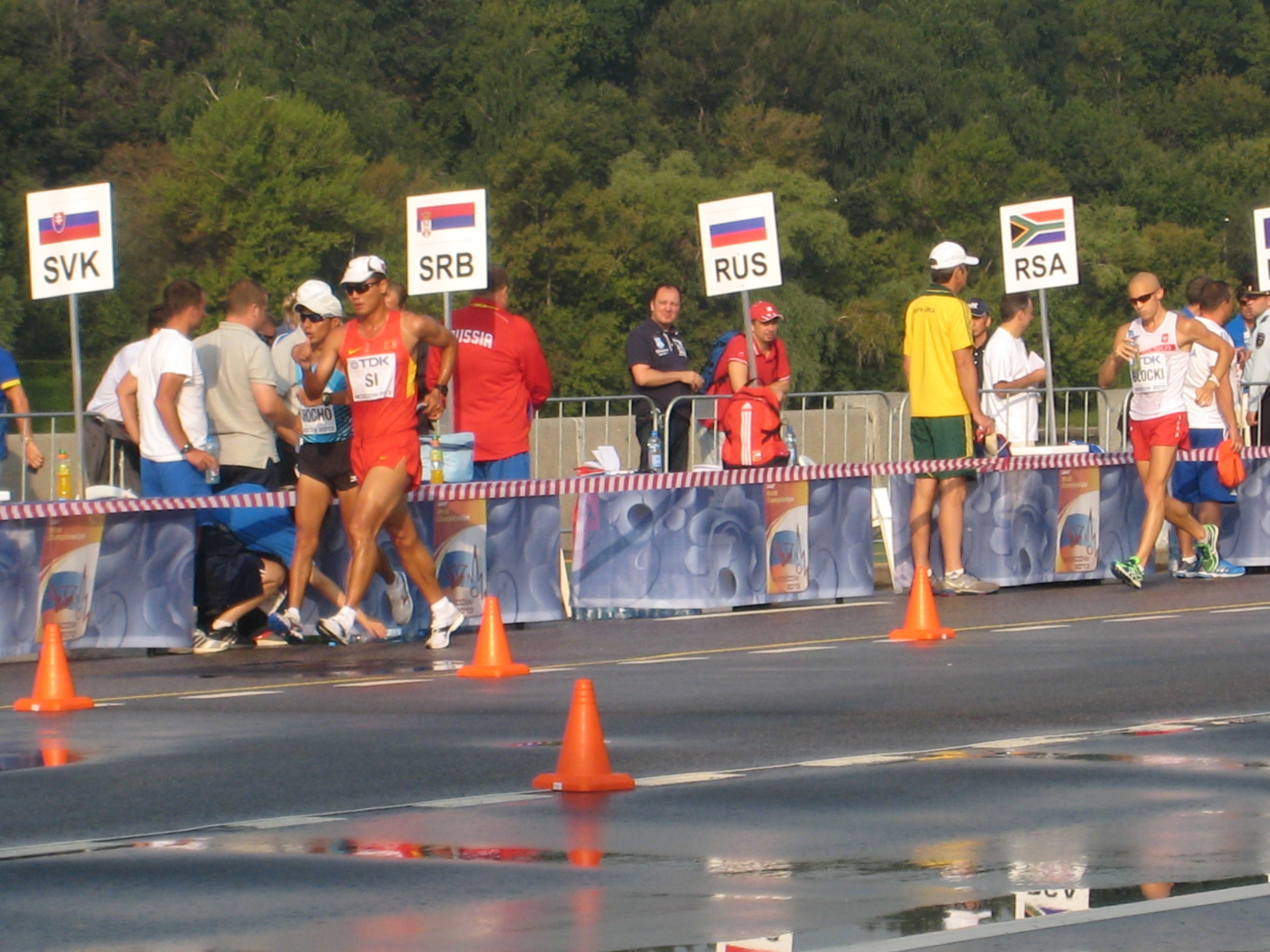 Чемпионат мира по лёгкой атлетике 2013. Ходьба 50 км, мужчины. Китаец Тянфень Си, эквадорец Андрес Чочо и поляк Адриан Блоцки